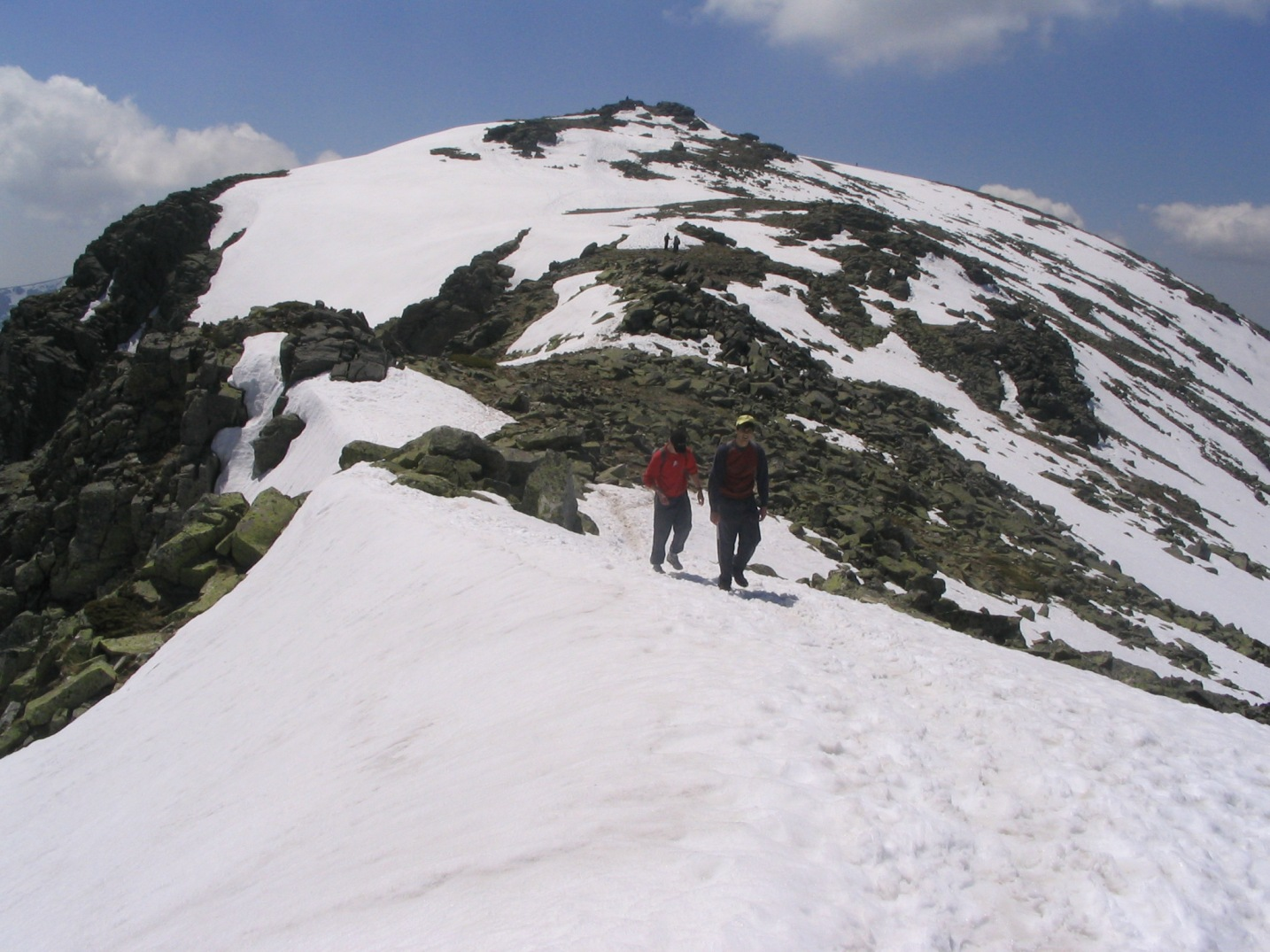 Cara norte del pico de Peñalara (Sierra de Guadarrama), España.